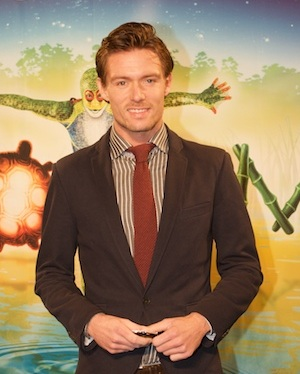 Musicalacteur en zanger Ron Link bij de Europese première van het Cirque du Soleil in Amsterdam (oktober 2010)